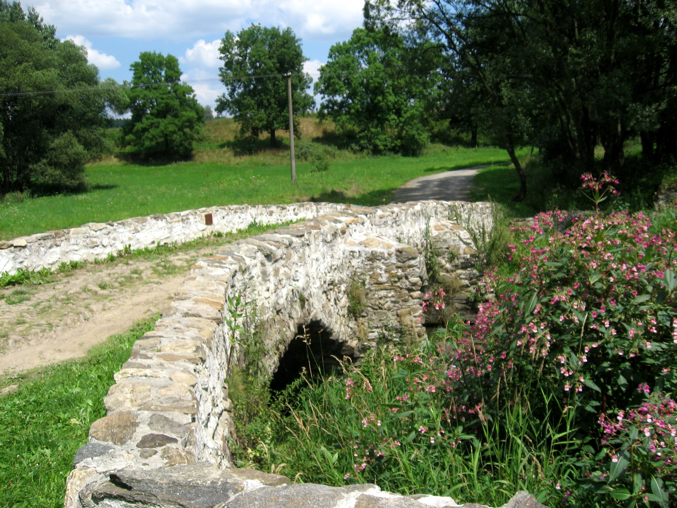 U Lutriána, někdy též zvaný Za Lutriánem, je tříobloukový středověký kamenný most přes říčku Šlapanku